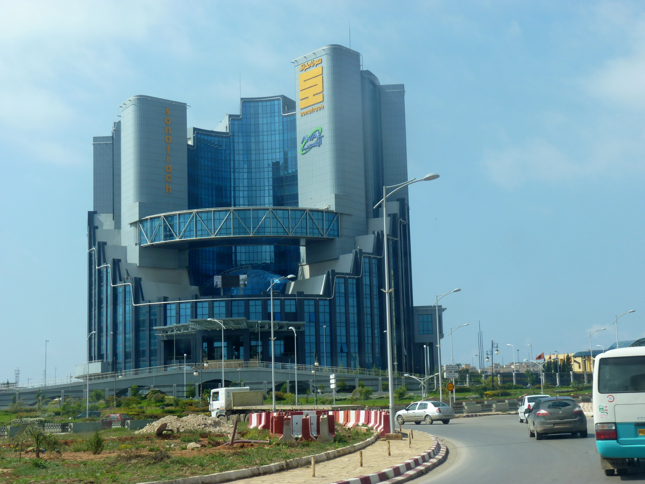 Siège de la SONATRACH à Ora (Algérie)